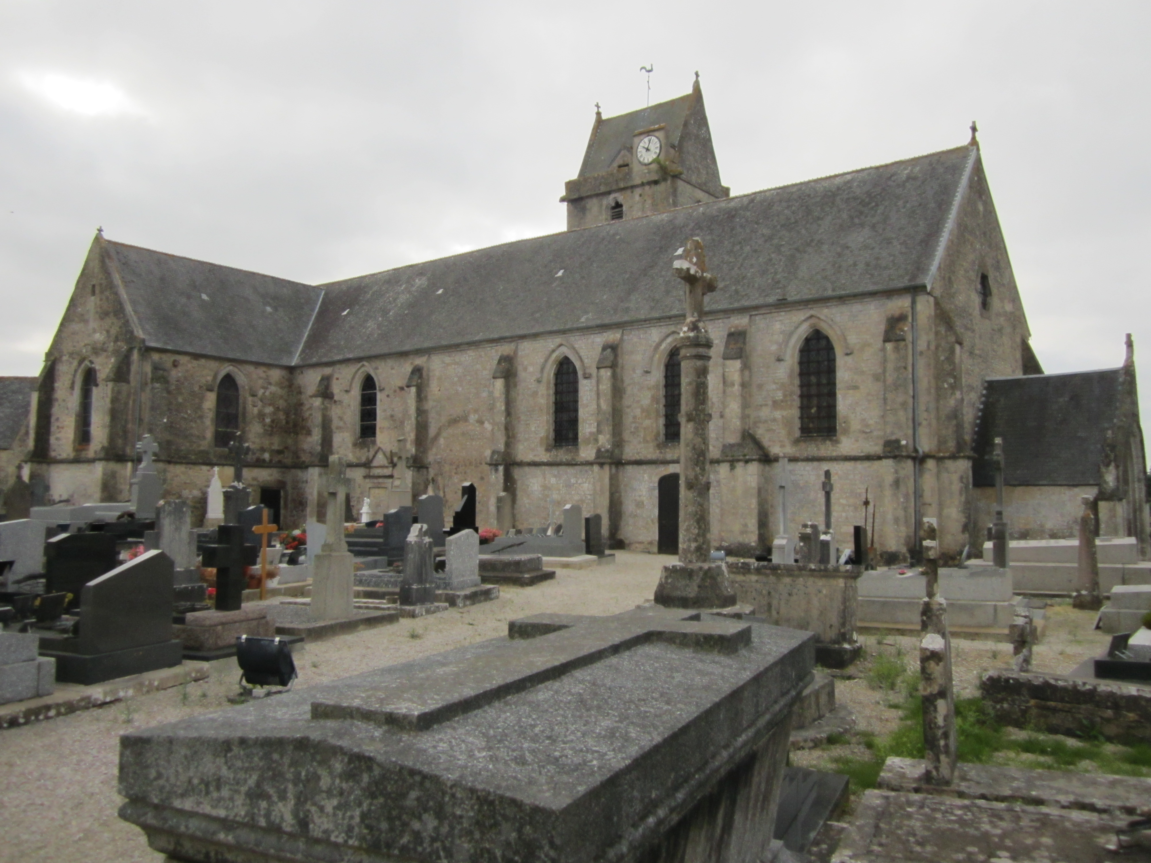 Négreville, Manche